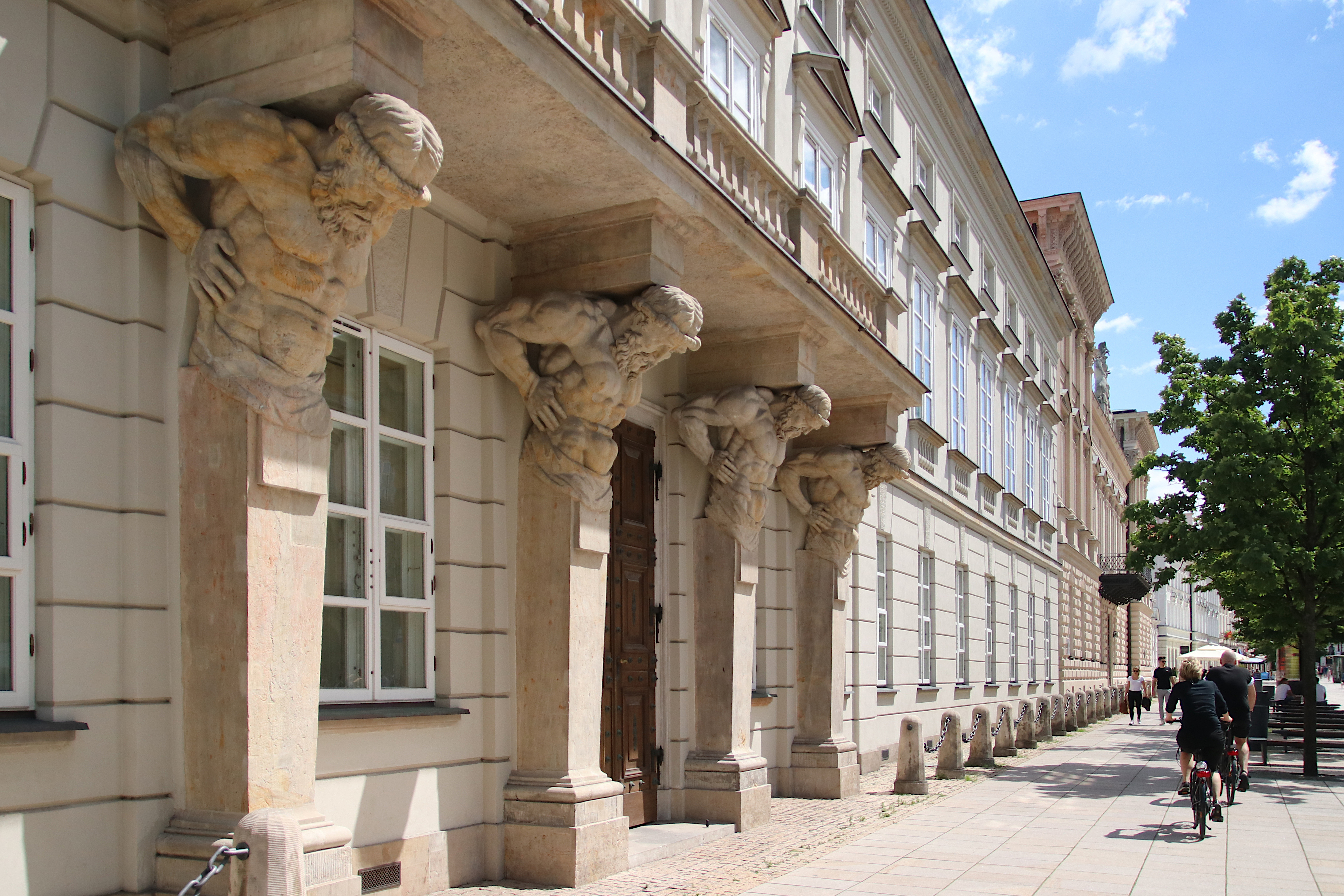 Pałac Tyszkiewiczów w Warszawie - wejście główne